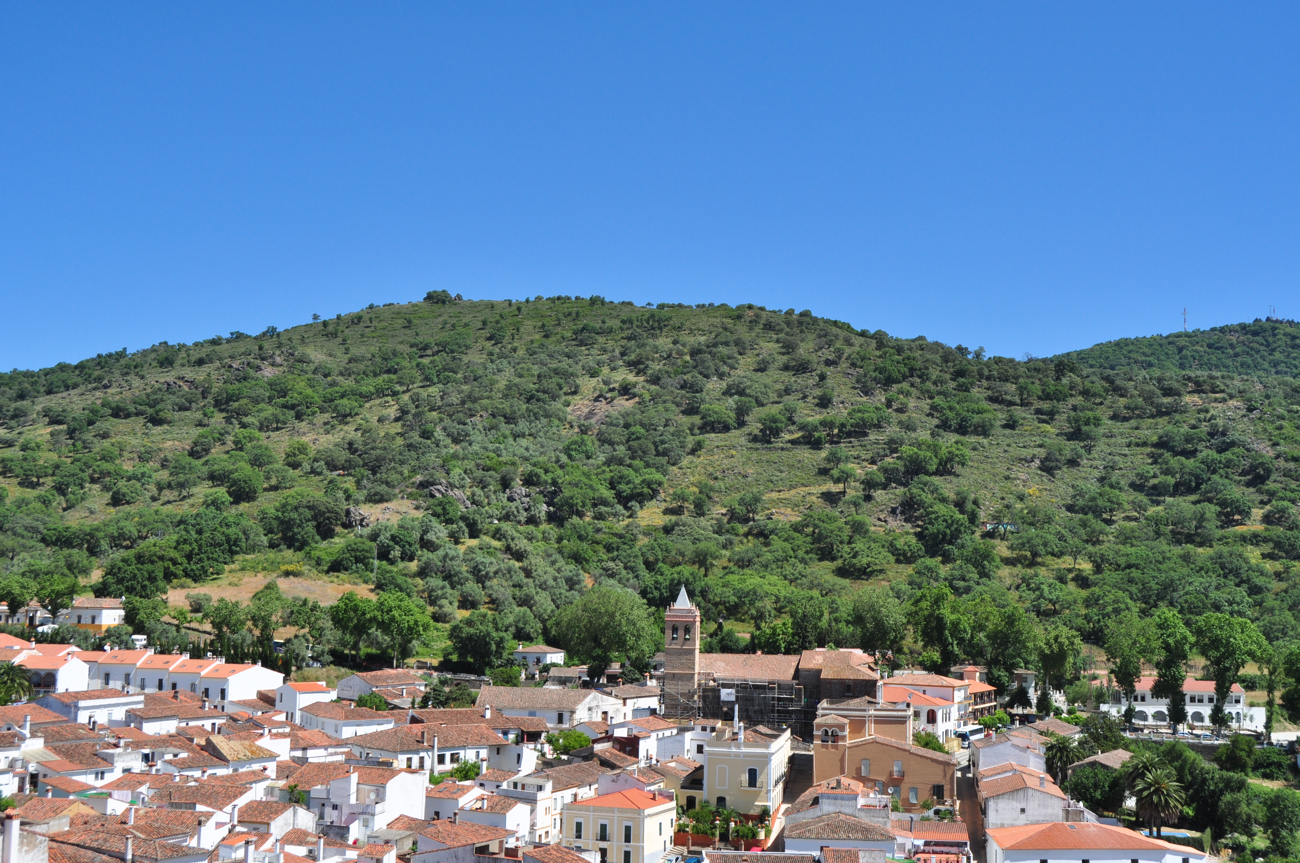 Almonaster la Real - 001